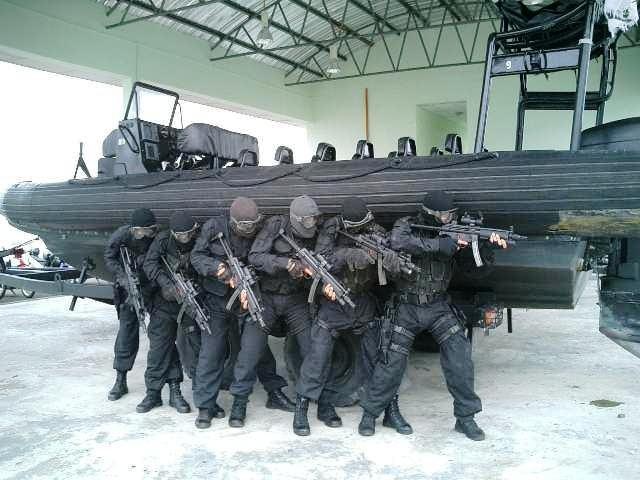 Pasukan elit PASKAL dengan senjata MP5A5 yang dilengkapi pejera Optik Taktikal CompM2 dan lampu suluh Surefire sedang bersiap sedia untuk menggempur musuh.